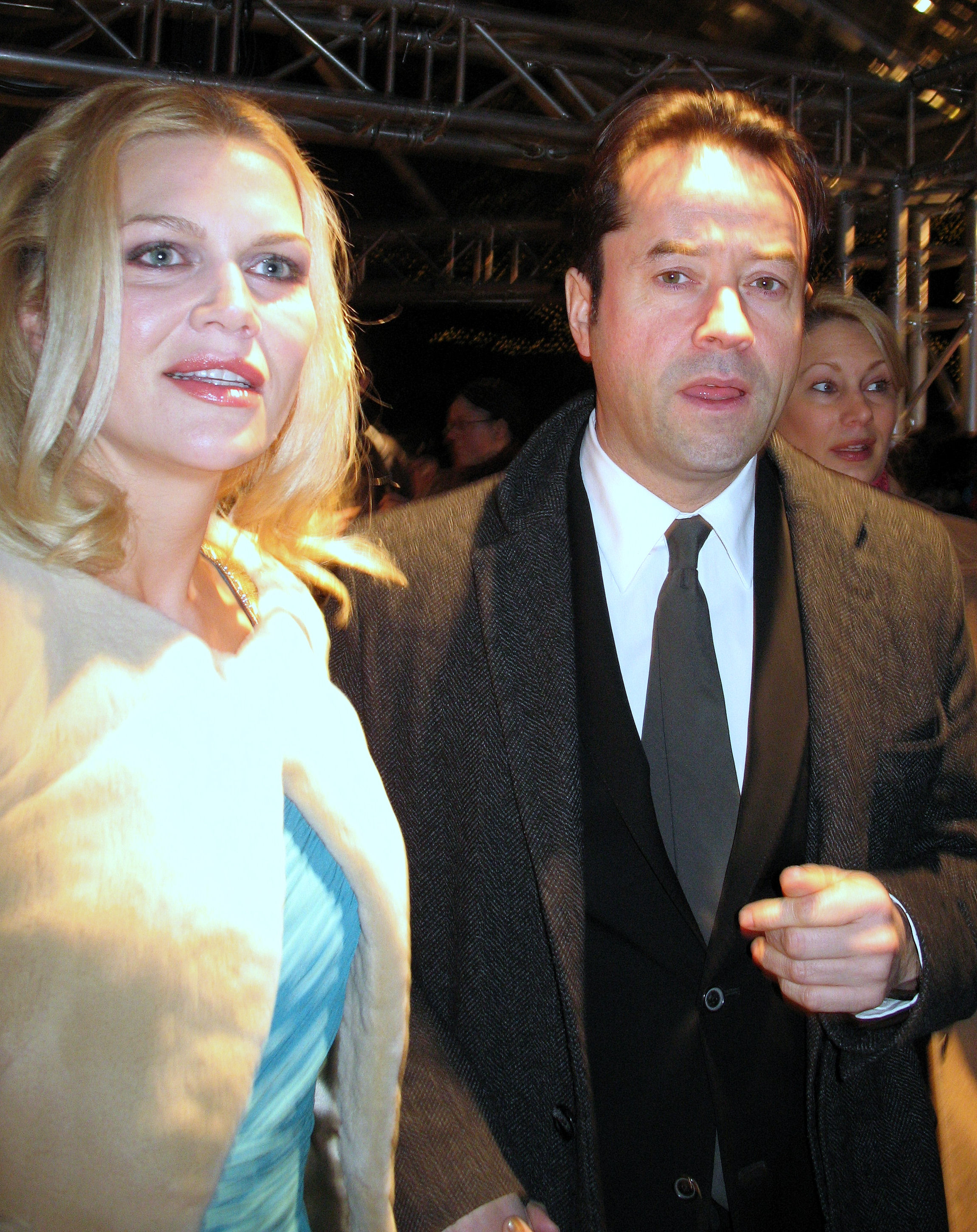 Anna Loos und Jan Josef Liefers bei der Eröffnung der Berlinale 2009, 2009-02-05